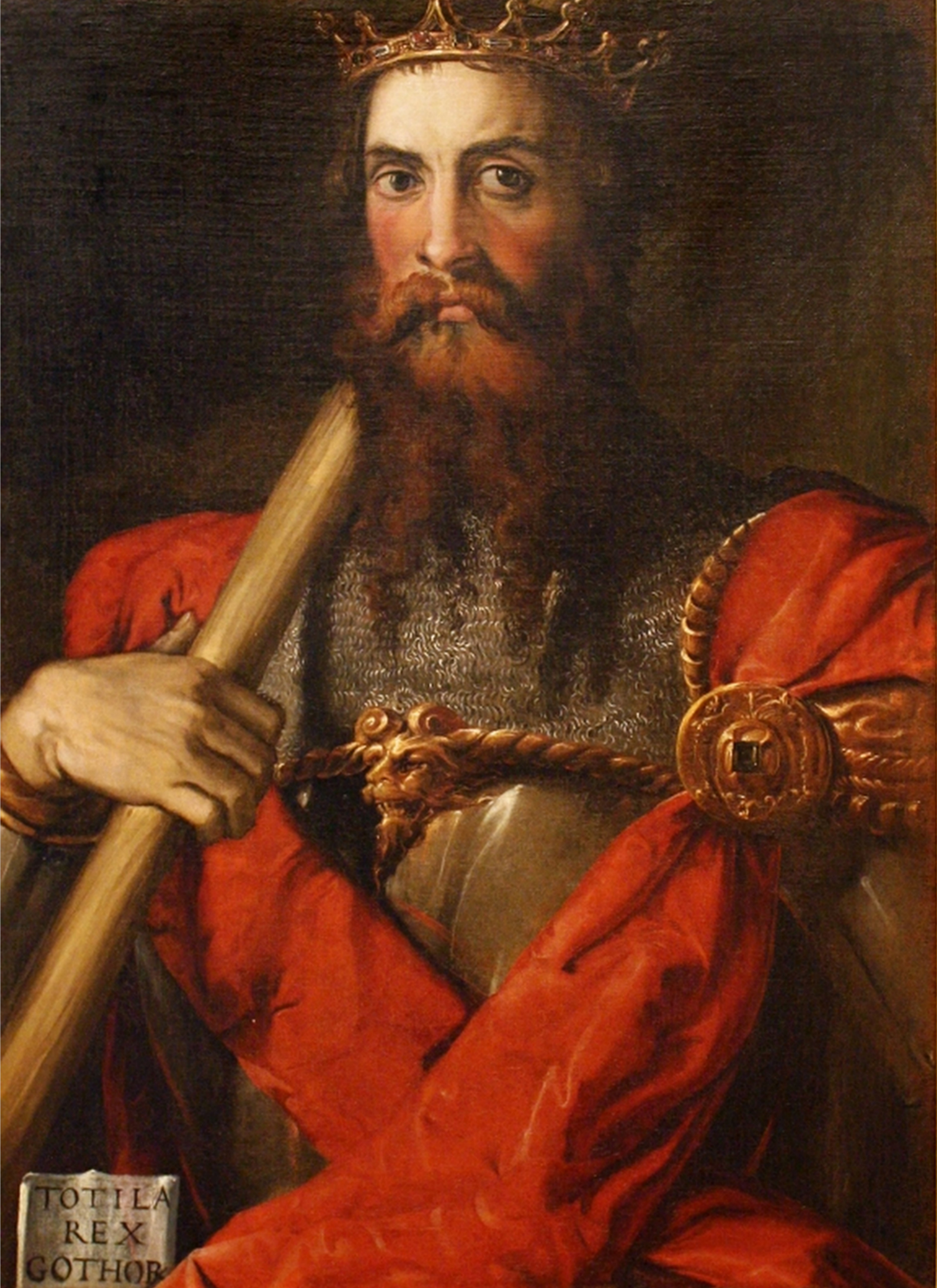 Portrét ostrogótského krále Totily.